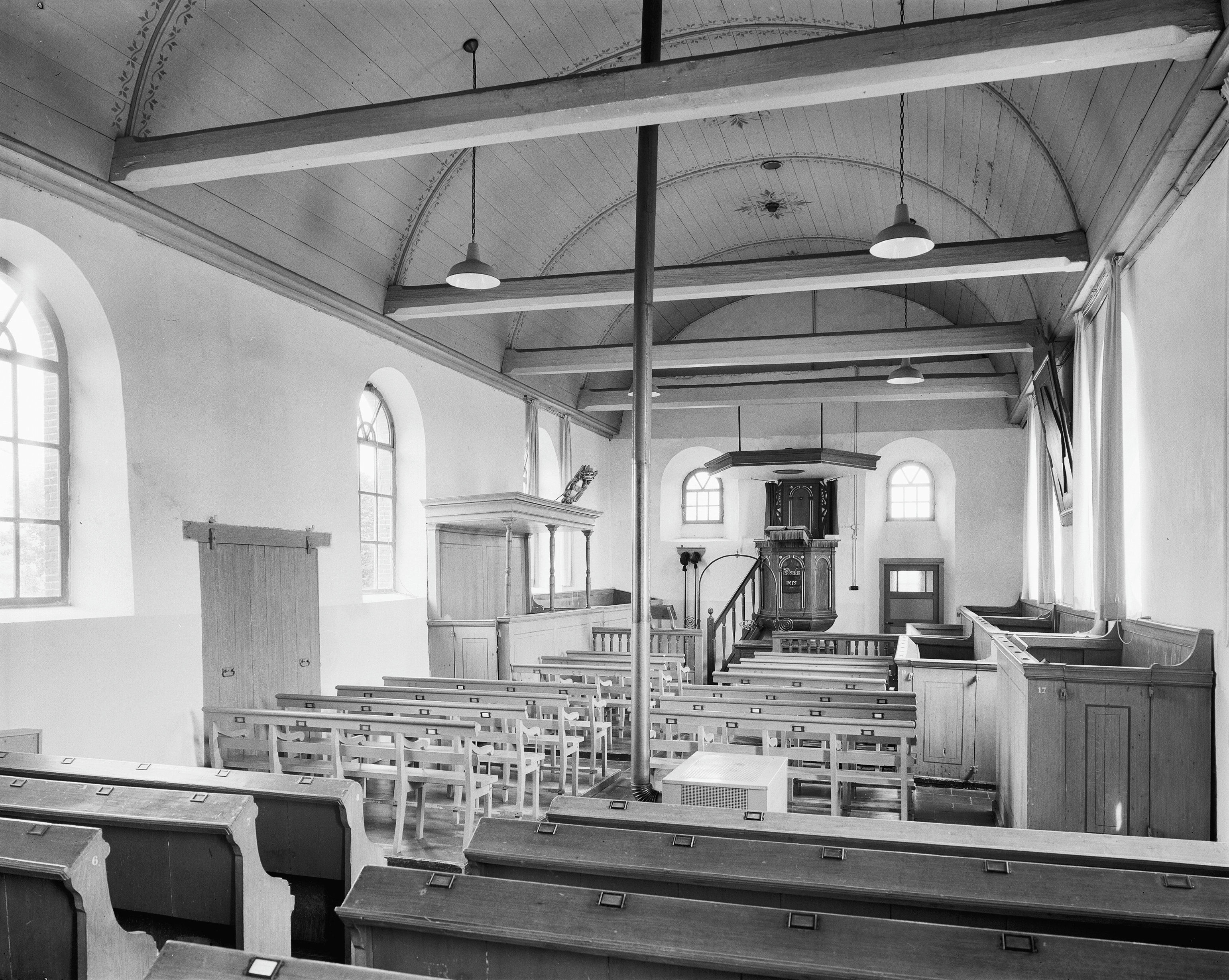 Nederlands Hervormde Kerk: interieur naar de preekstoel